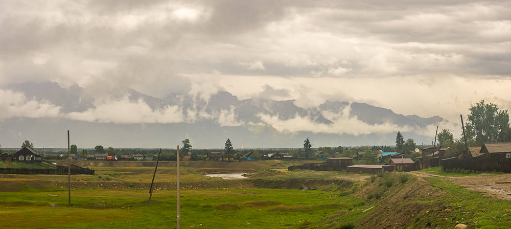 Посёлок Кырен летом 15 года.